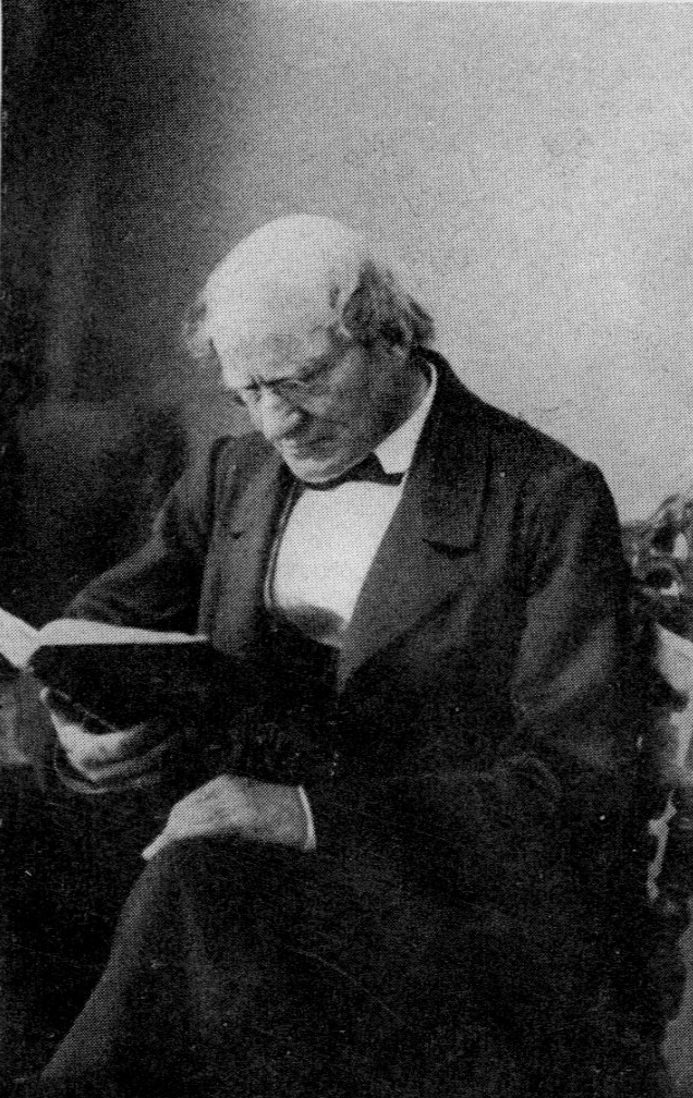 Wilhelm Wackernagel (1806—1869), German philologist